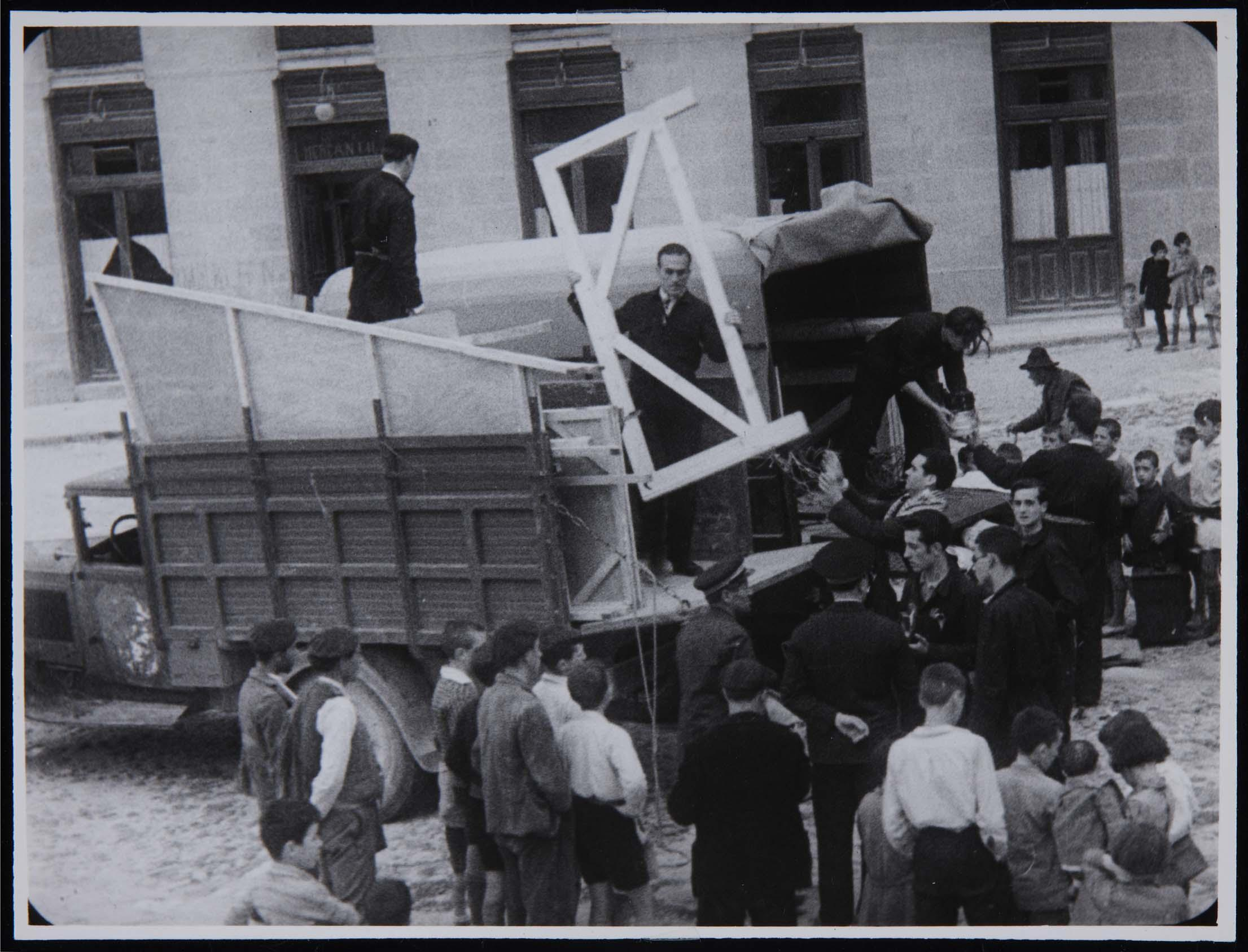 Montaje del escenario por los componentes de La Barraca para la representación de «La guarda cuidadosa», de Miguel de Cervantes (Almazán, Soria) (julio de 1932). Fotografía anónima. Colección del Museo Nacional Centro de Arte Reina Sofía, Madrid, España